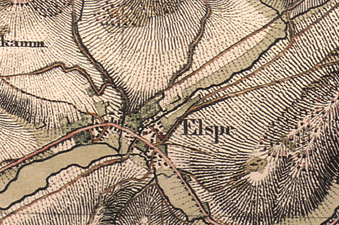 Ausschnitt Elspe, preußische Uraufnahme 1841, Historika25 Blatt Lennestadt